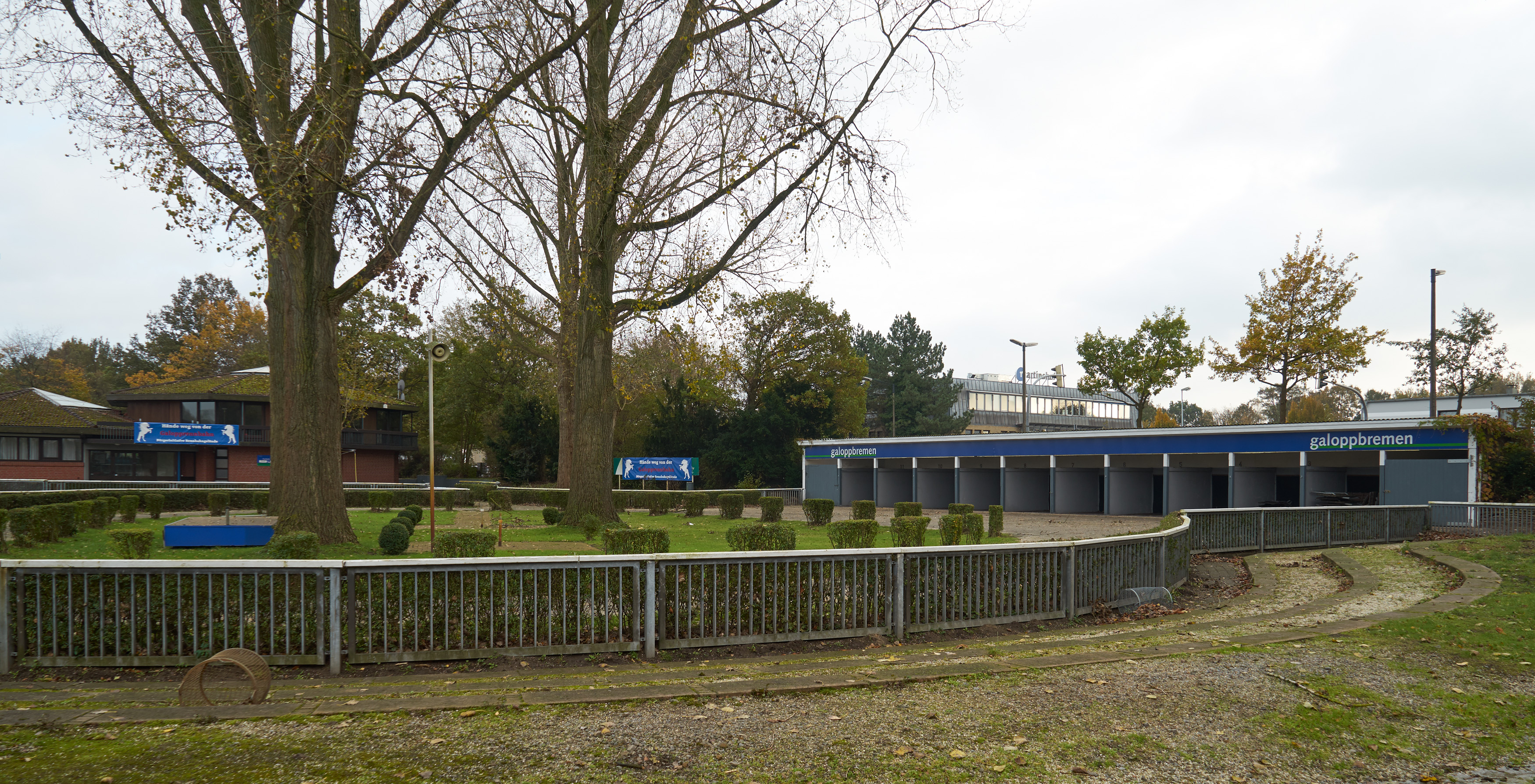 Galopprennbahn Bremen. Führring